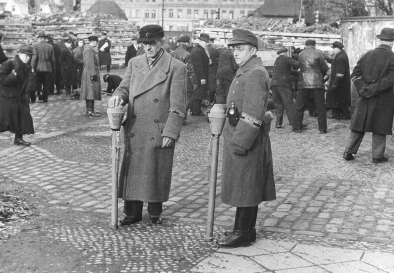 Berlin, Bau einer Panzersperre Scherl: ADN-ZB/Archiv Das faschistische Deutschland im II. Weltkrieg 1939-45 Berlin wird am 1. Februar 1945 zum "Verteidigungsbereich" erklärt. Zwei mit Panzerfäusten bewaffnete Volkssturmsoldaten stehen Posten beim Bau einer Panzersperre am S-Bahnhof Hermannstraße in Neukölln am 10. März.. 297-45